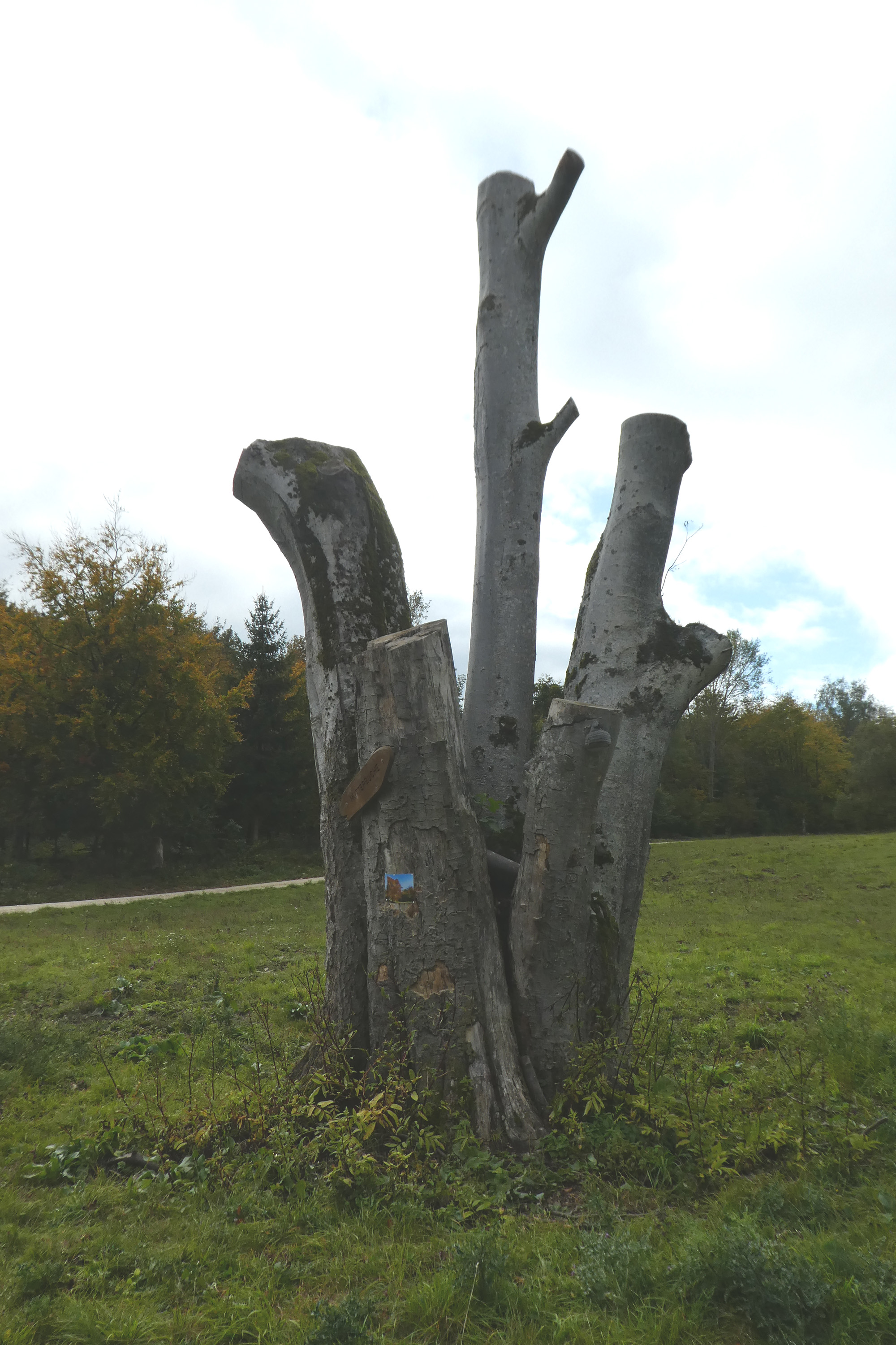 Volkmarsberg: Reste der Mutterbuche